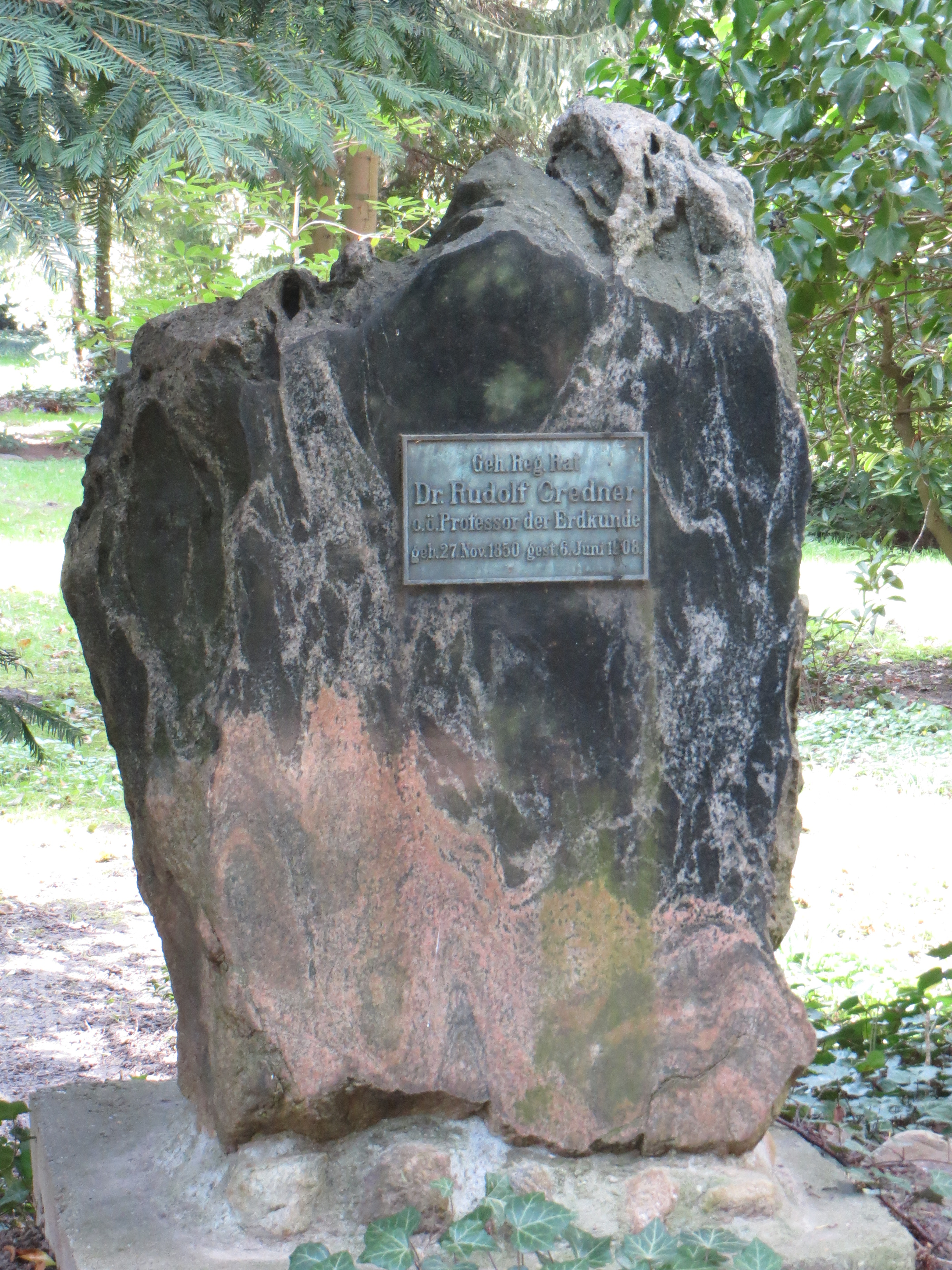 Greifswald, Alter Friedhof